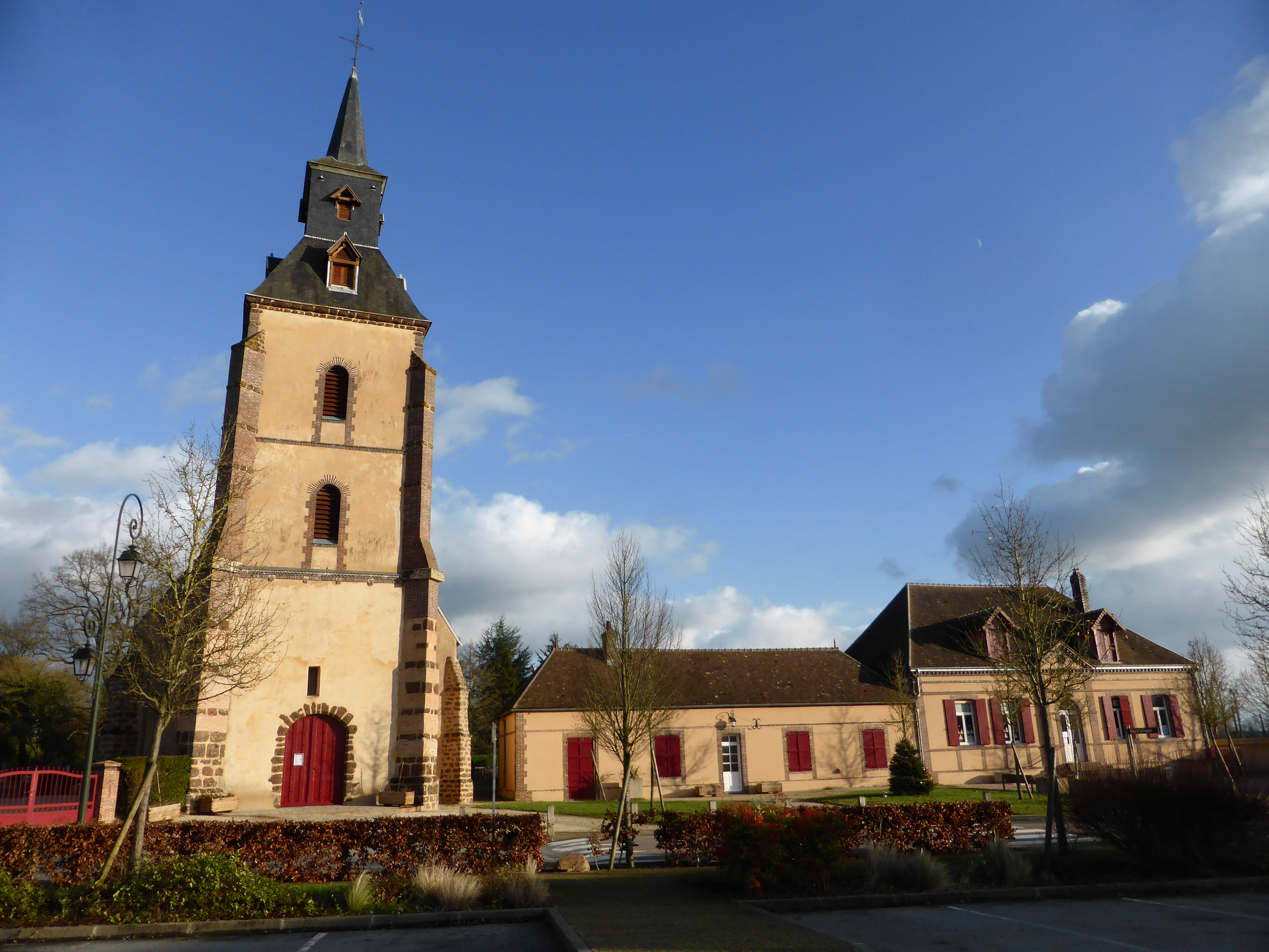 Bibliothèque et église Saint-Jean de Belhomert, en Eure-et-Loir.